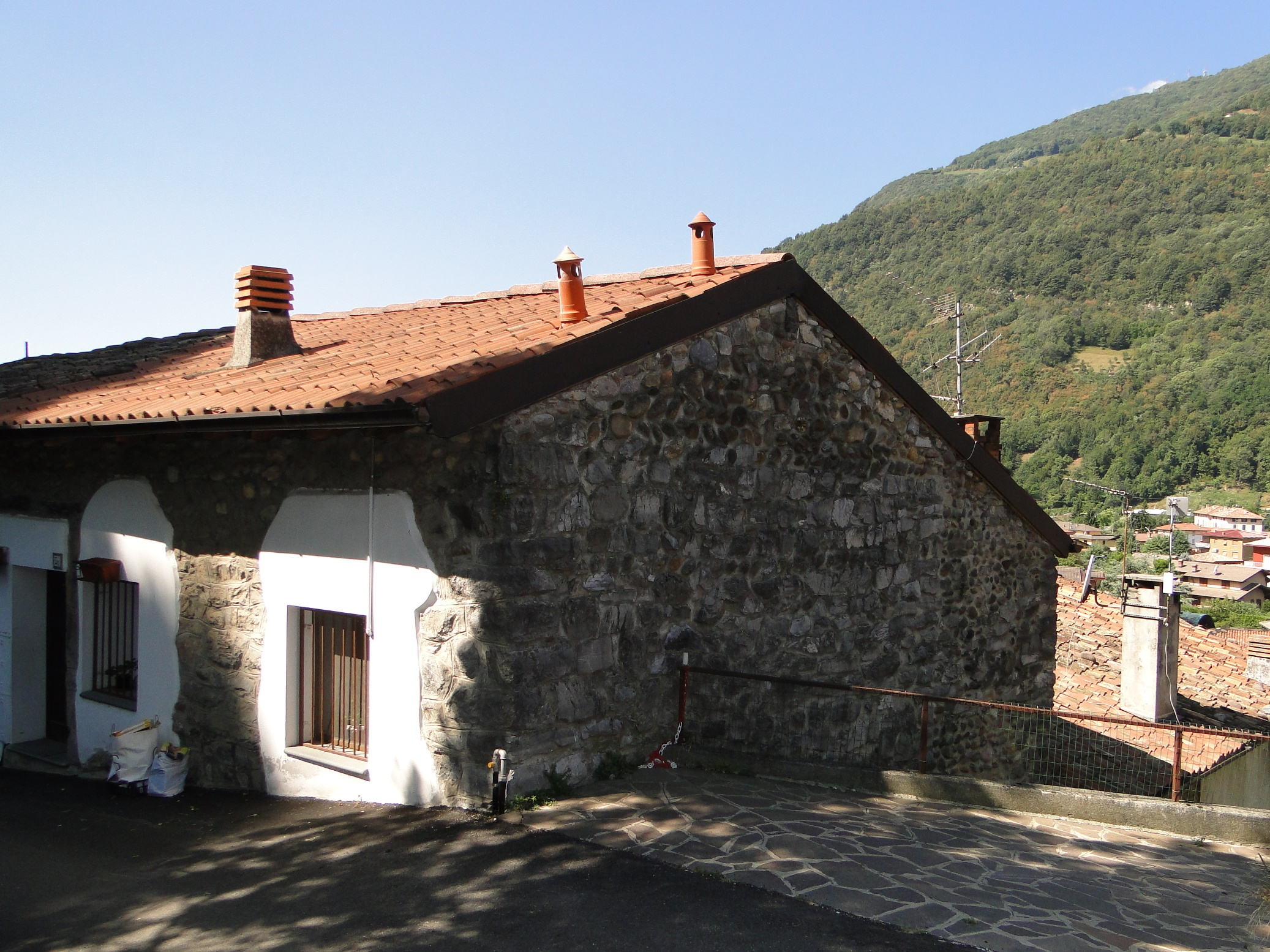 Il castello medievale. Cene (BG), Italia